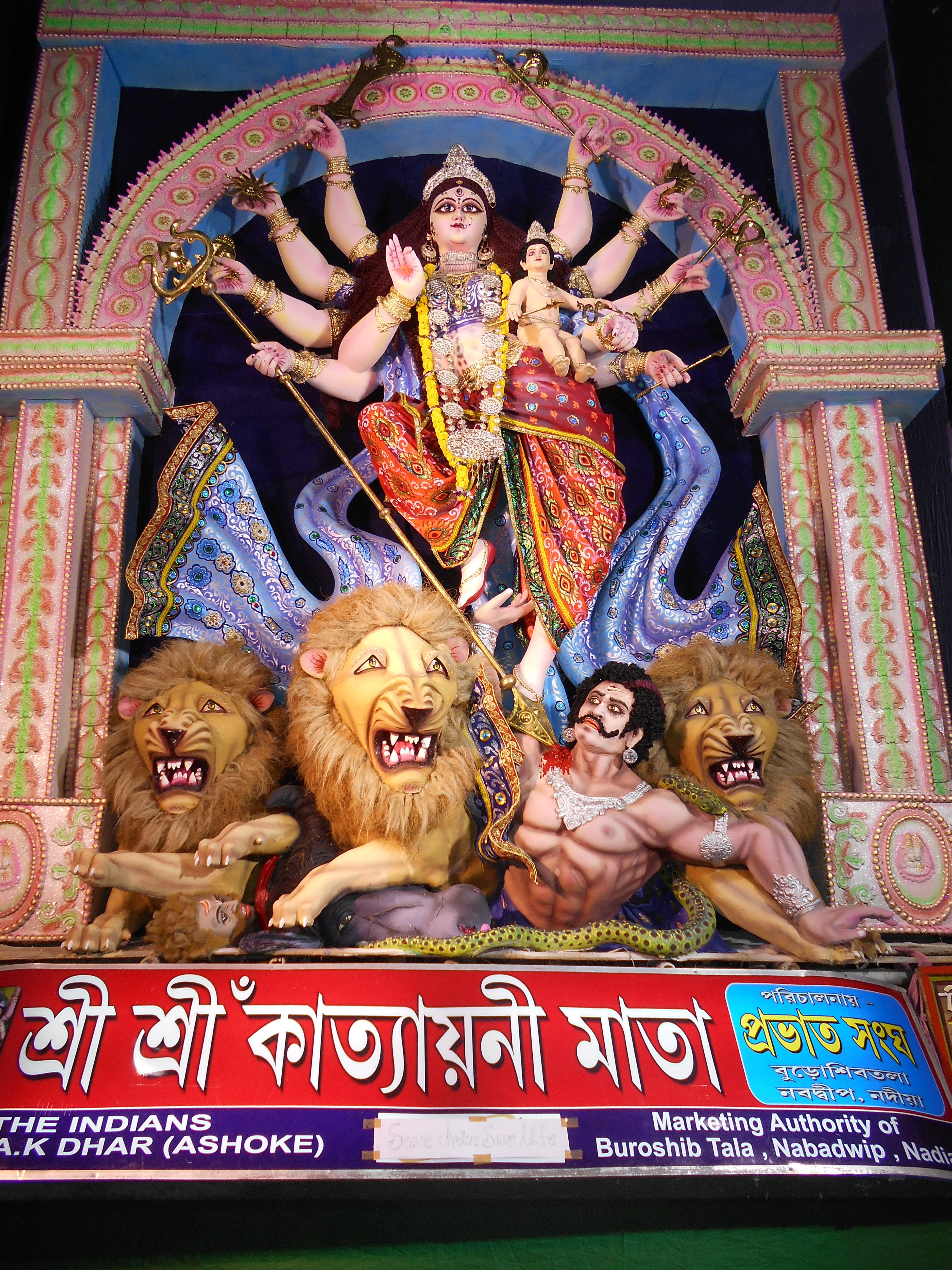 নবদ্বীপ রাসযাত্রায় কাত্যায়নী মাতা